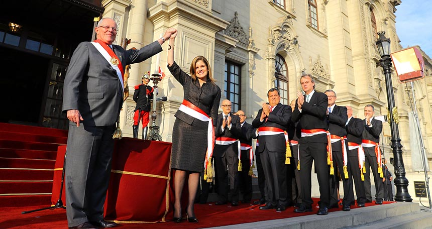 JEFE DE ESTADO TOMÓ JURAMENTO A LOS MIEMBROS DE SU GABINETE MINISTERIAL